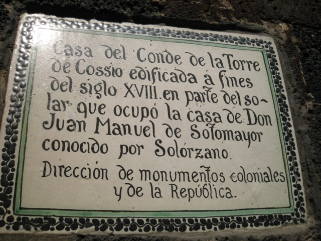 Placa en la Fachada de la Casa de los Condes de la Torre Cossío